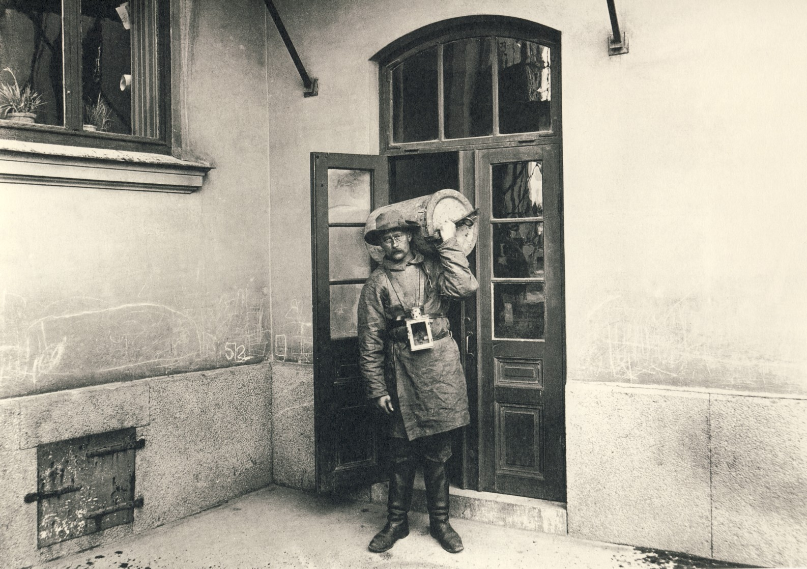 En latrinman i Stockholm på 1900-talets början.